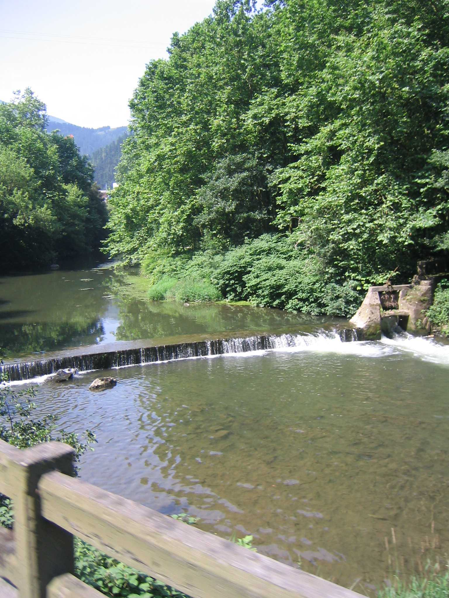 Río Urola a su paso por Cestona, Guipúzcoa, País Vaco, España.